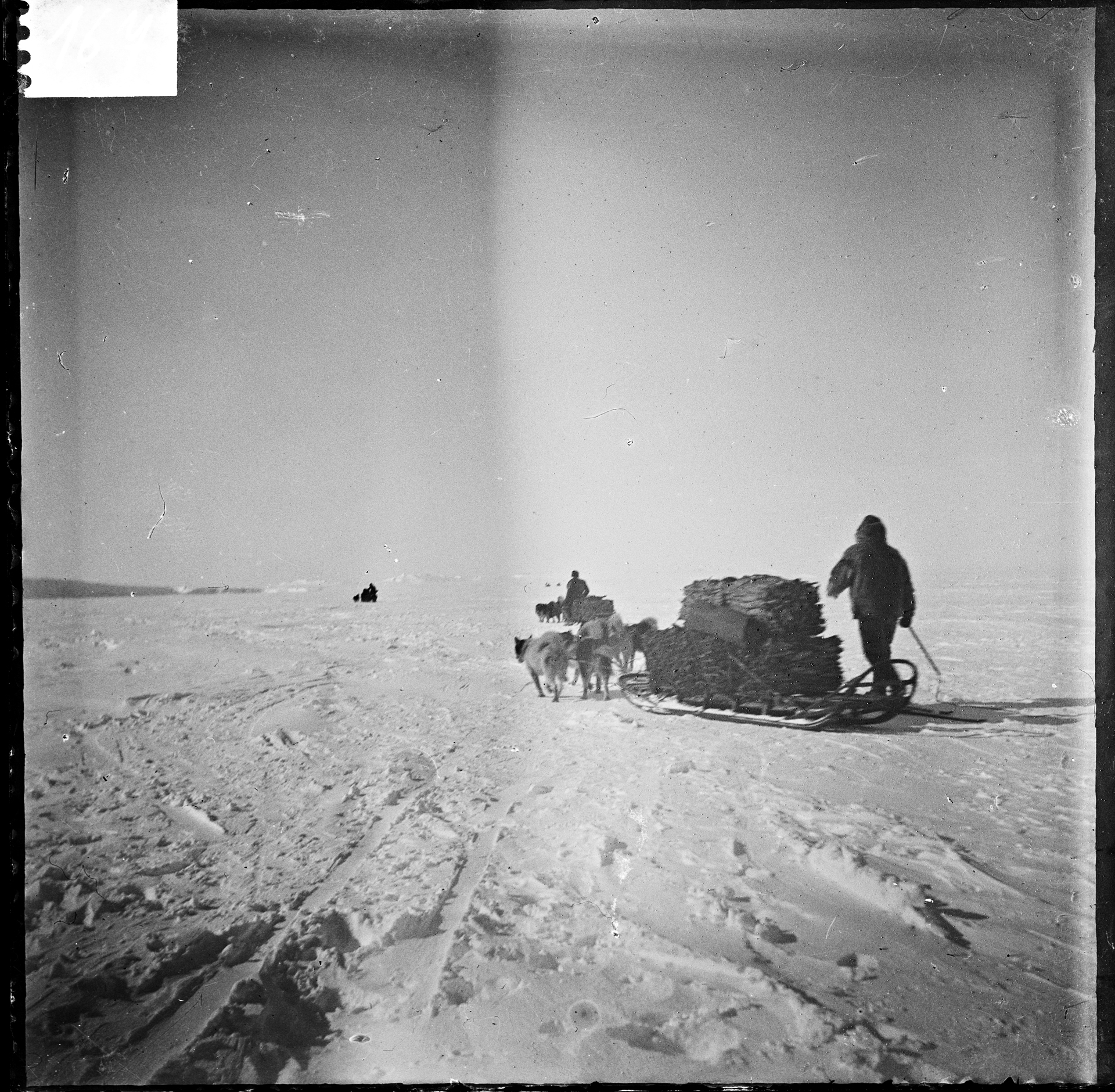 Tittel / Title: Proviant kjøres på slede fra "Fram" til Framheim Motiv / Motif: Negativ glassplate. Dato / Date: januar/februar 1911 Fotograf / Photographer: ukjent / unknown Sted / Place: Antarktis, Hvalbukta Eier / Owner Institution: Nasjonalbiblioteket / National Library of Norway Lenke / Link: Bildesignatur / Image Number: bldsa_NPRA1065